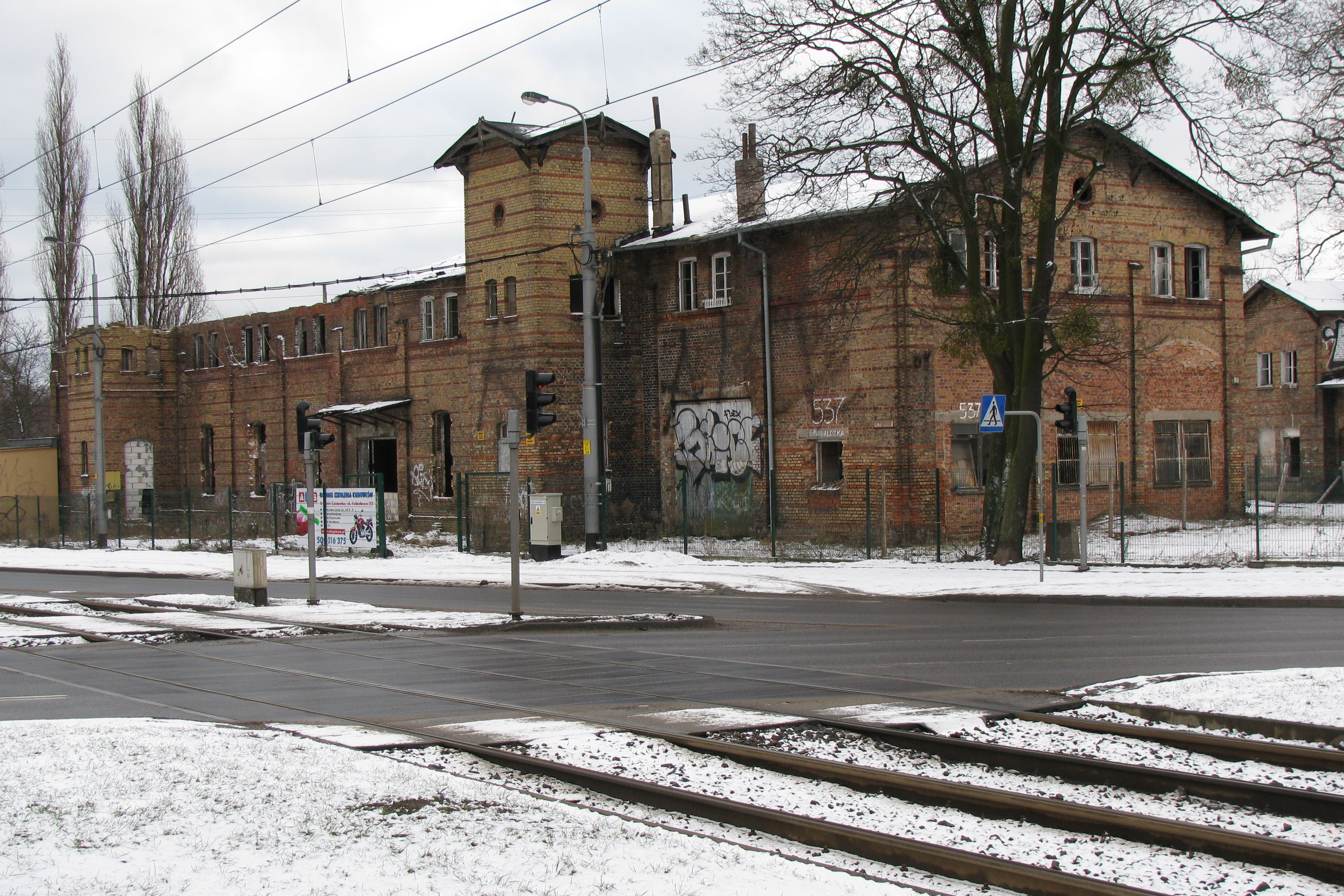 Gdańsk Oliwa, Aleja Grunwaldzka 537 / róg ul. Pomorskiej - dawna fabryka, następnie zajezdnia tramwajowa, 1870 (budynek główny, fasada północna)